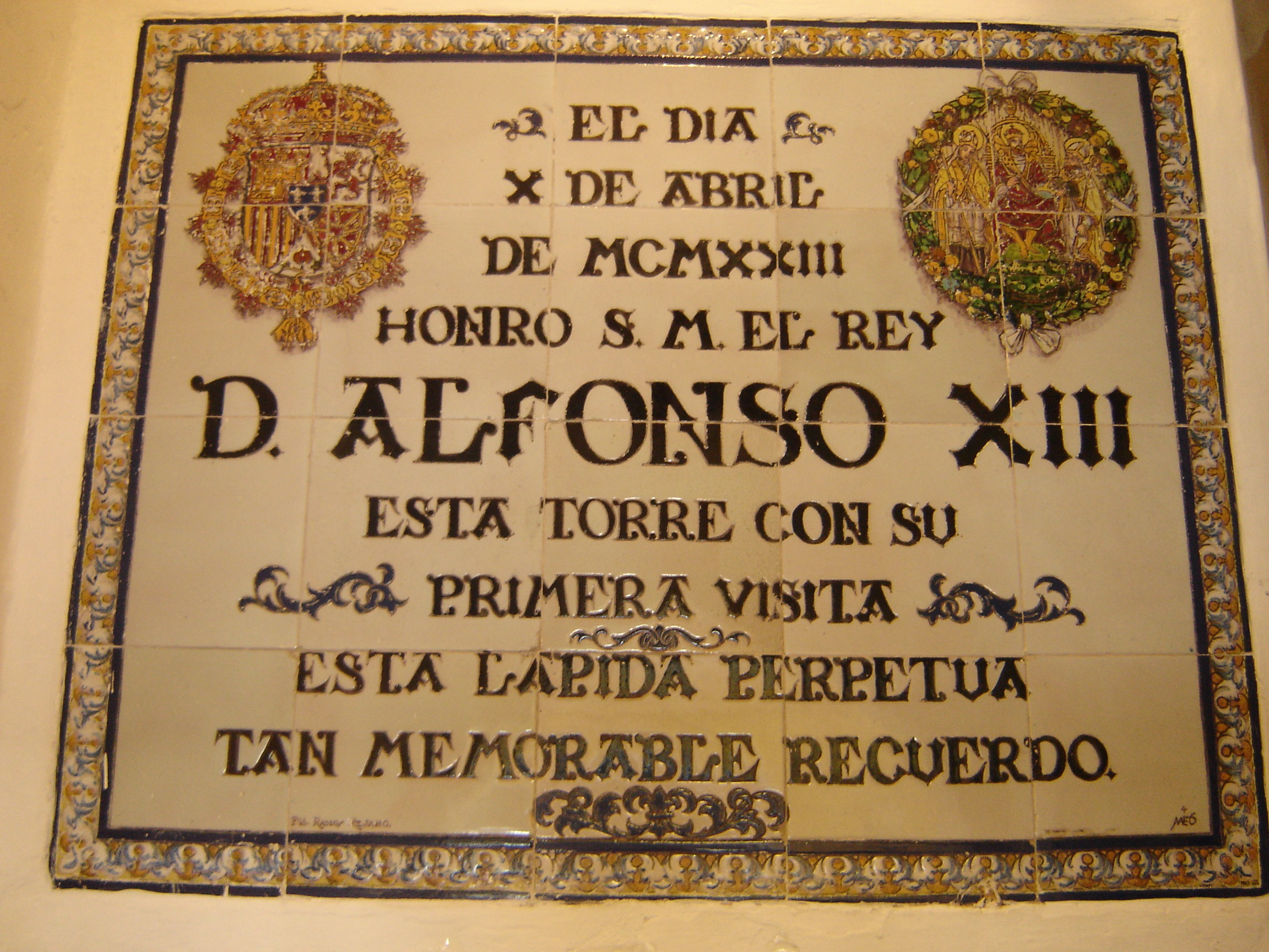 Conmemoración de la visita del rey Alfonso XIII a la Torre del Oro (Museo Naval, Sevilla, España).